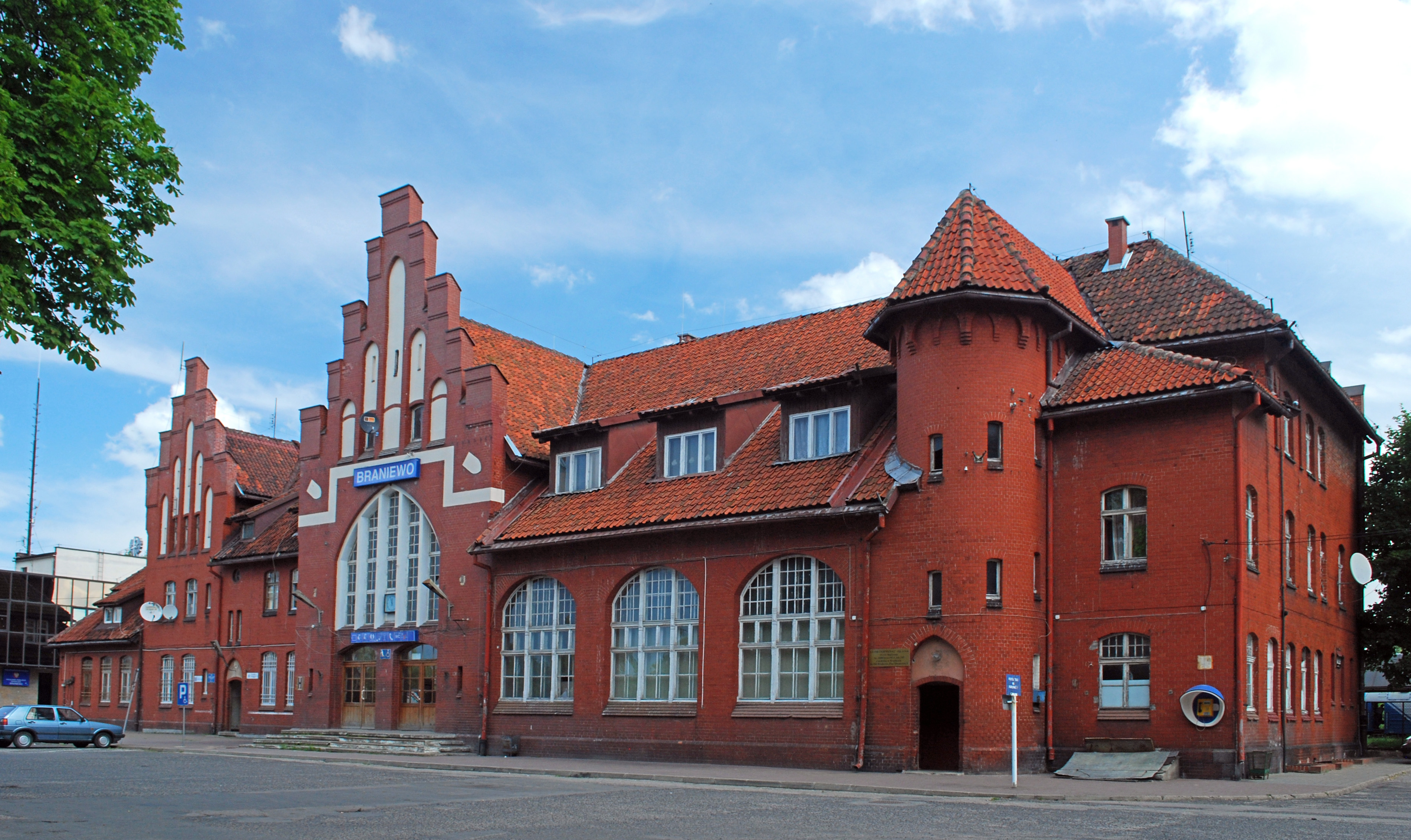 Dworzec kolejowy w Braniewie